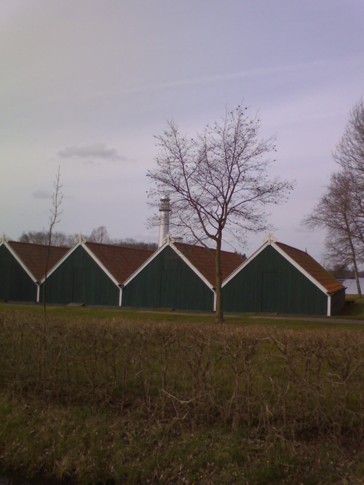 Boothuizen en op de achtergrond de vuurtoren Paterswoldsemeer